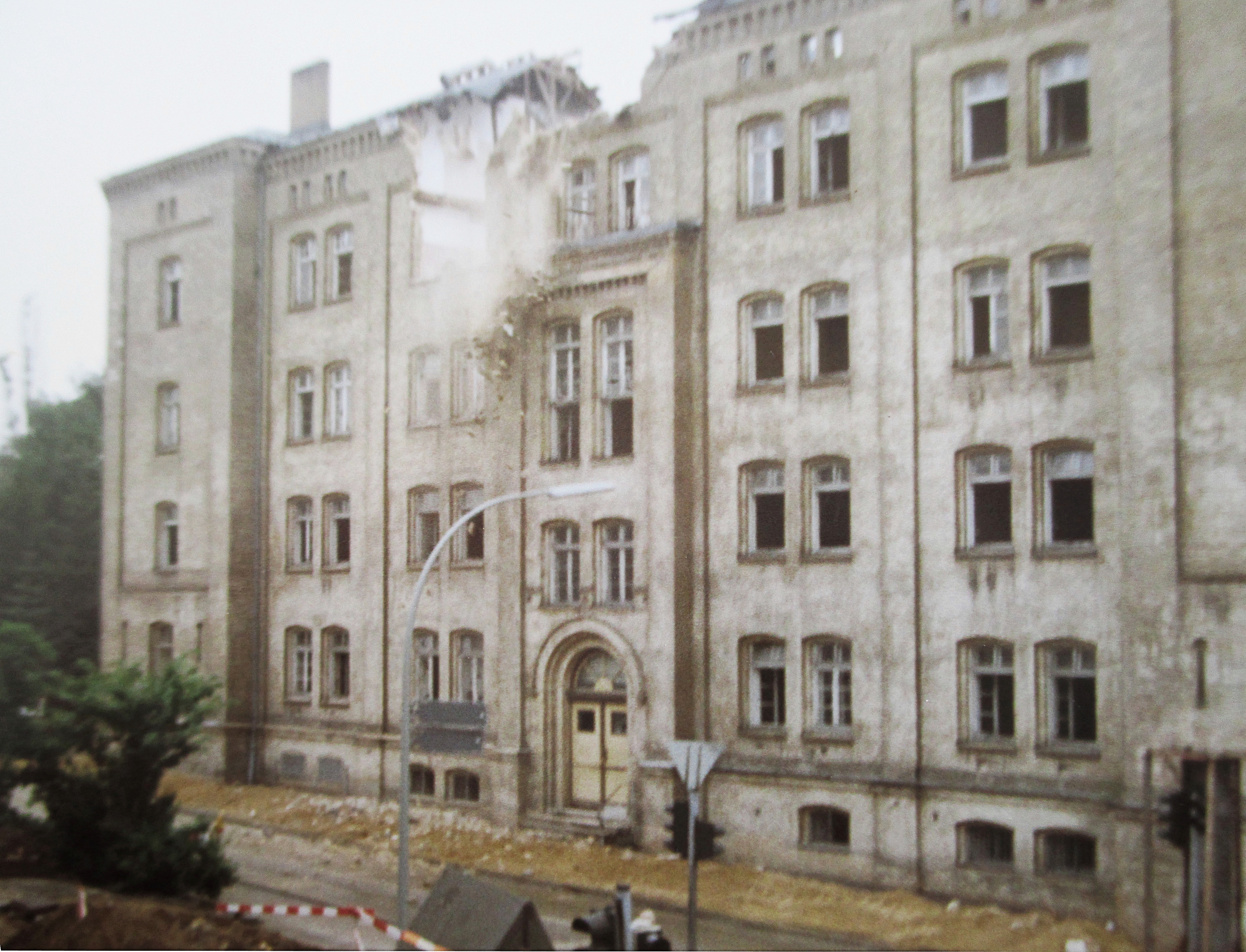 Flensburg Duburg Kasernen 1988; Fotos erkennbarer weise aus einem Privatalbum im nachhinein nochmals abfototgrafiert